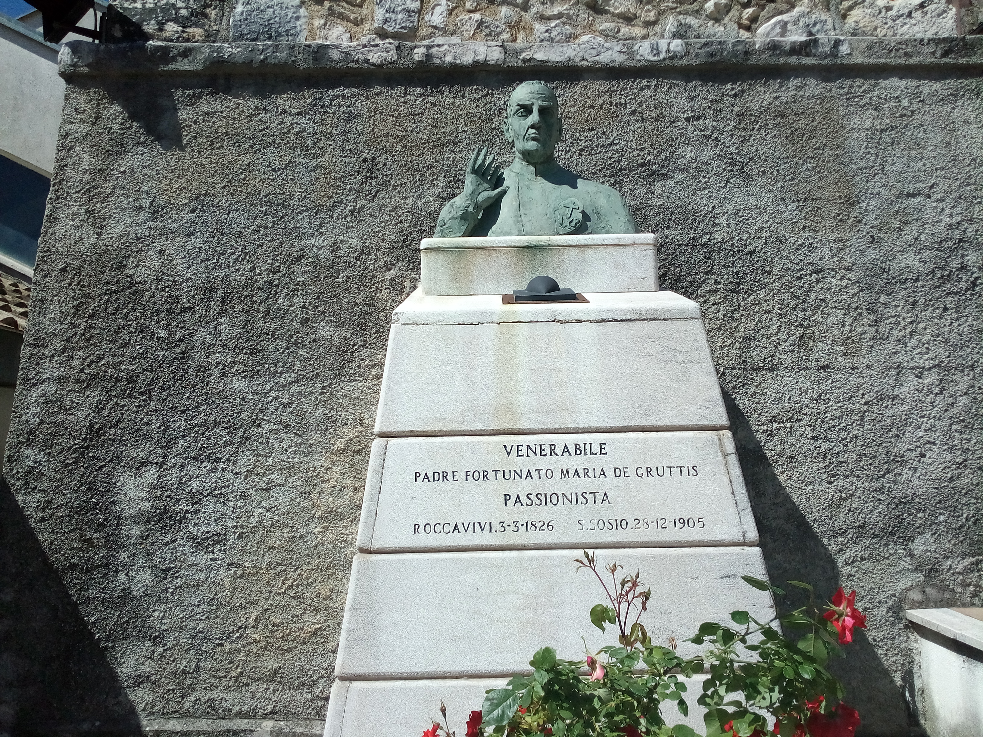 Busto in memoria di Paolo Fortunato Maria De Gruttis a Roccavivi